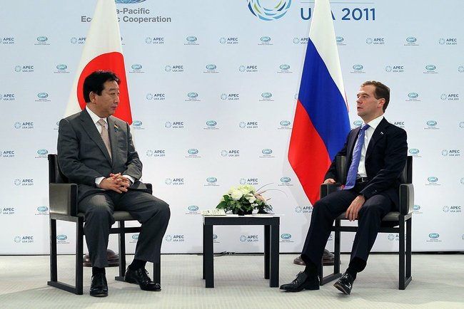 С Премьер-министром Японии Ёсихико Нодой.